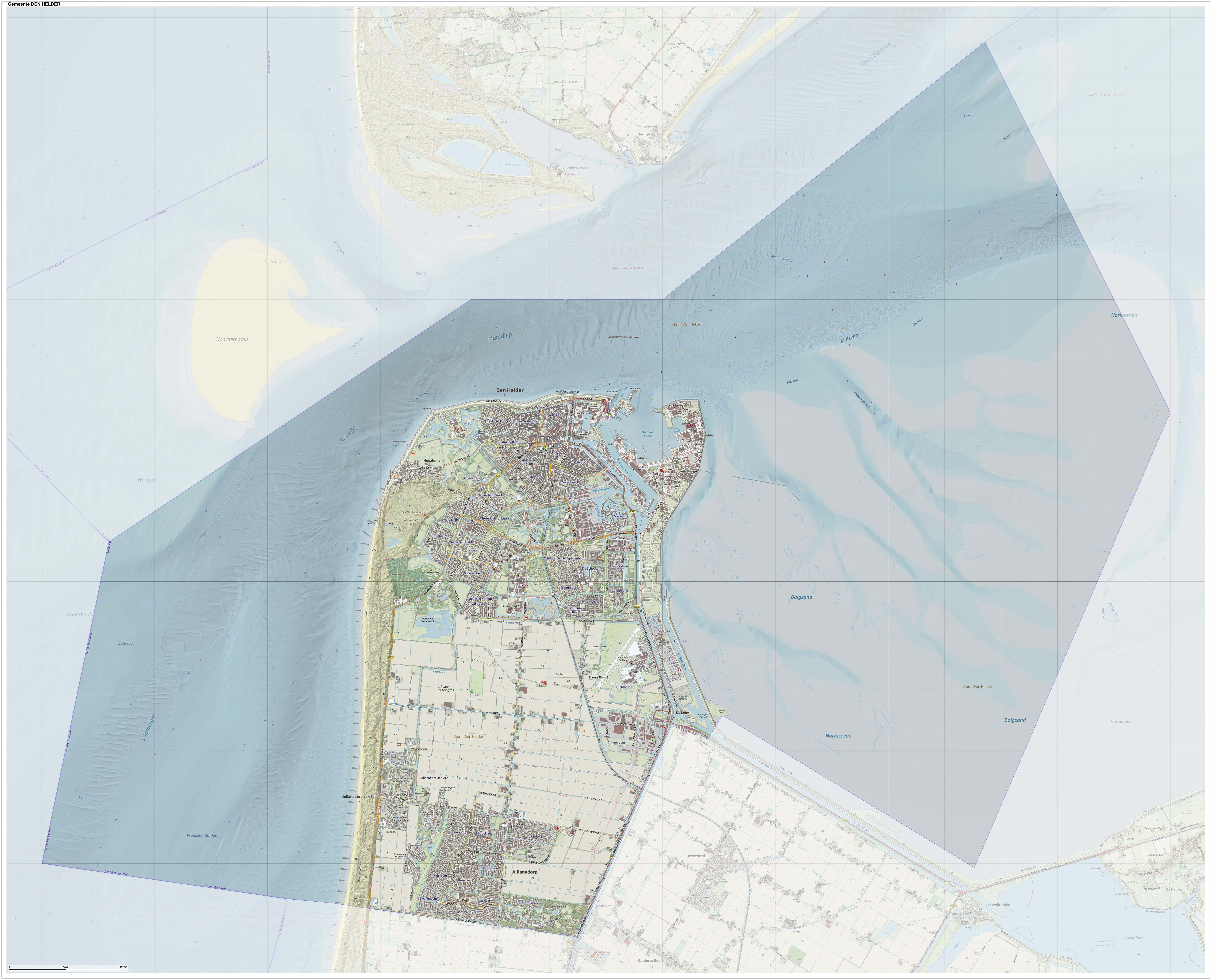 Topografische gemeentekaart. Resolutie: 400 pixels/km. Kaartbeeld samengesteld uit de open geodata van de Top10NL en Top25namen (Kadaster), Creative Commons-BY licentie. Gebouwvlakken uit open geodata BAG extract. Wegen uit de OpenStreetMap, OpenStreetMap community. Reliëfschaduw uit de Actuele Hoogtekaart AHN2. Samenstelling en kleurenschema: Jan-Willem van Aalst, met QGIS. Zie ook de Legenda.